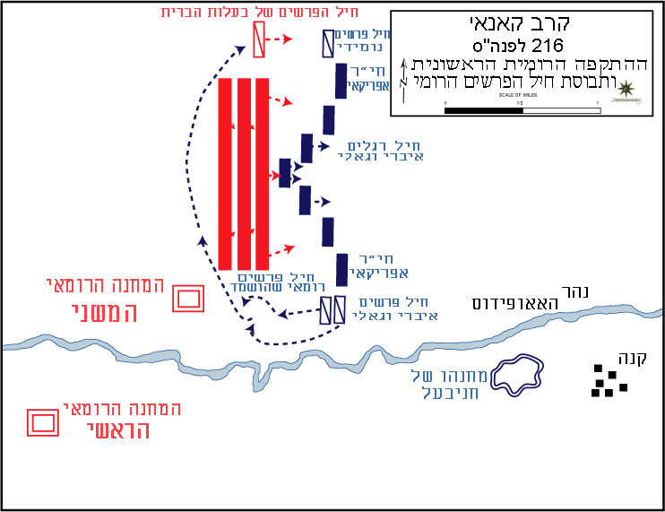 ההתקפה הרומית הראשונית והשמדת חיל הפרשים הרומי בקרב קנה